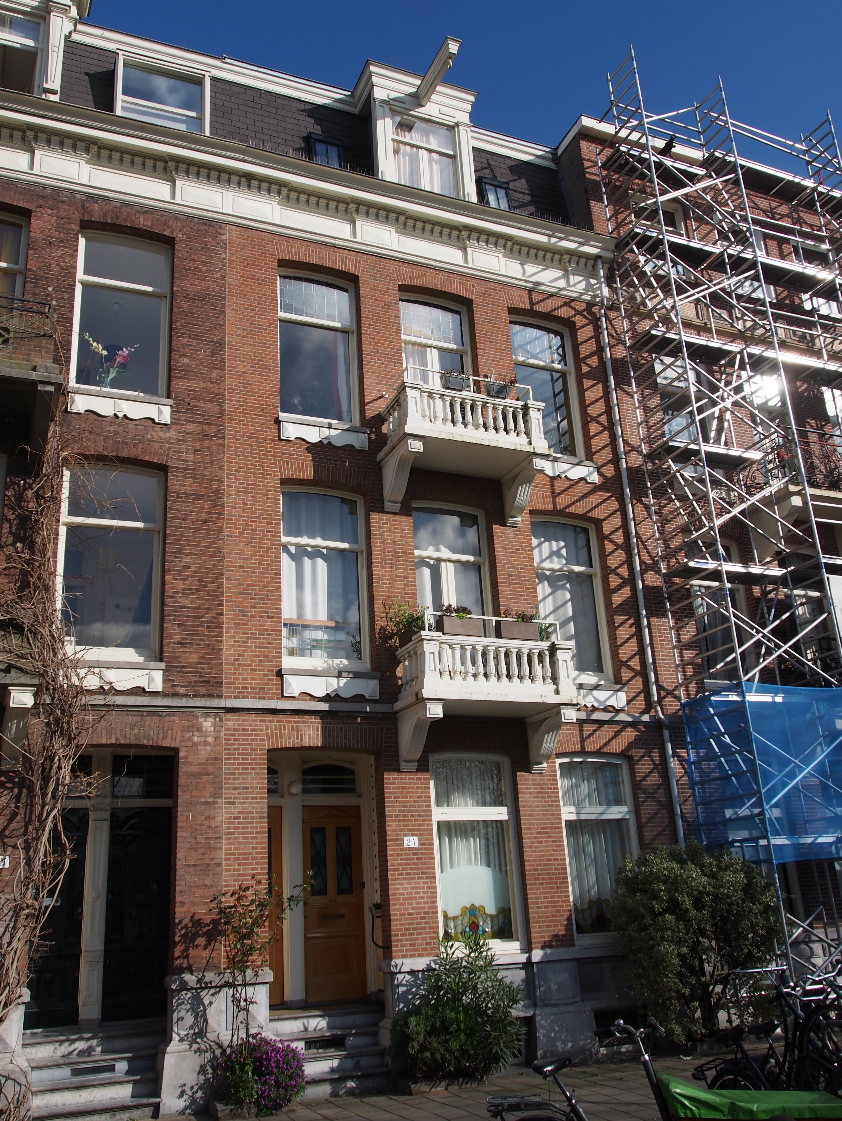 Monument in Amsterdam.